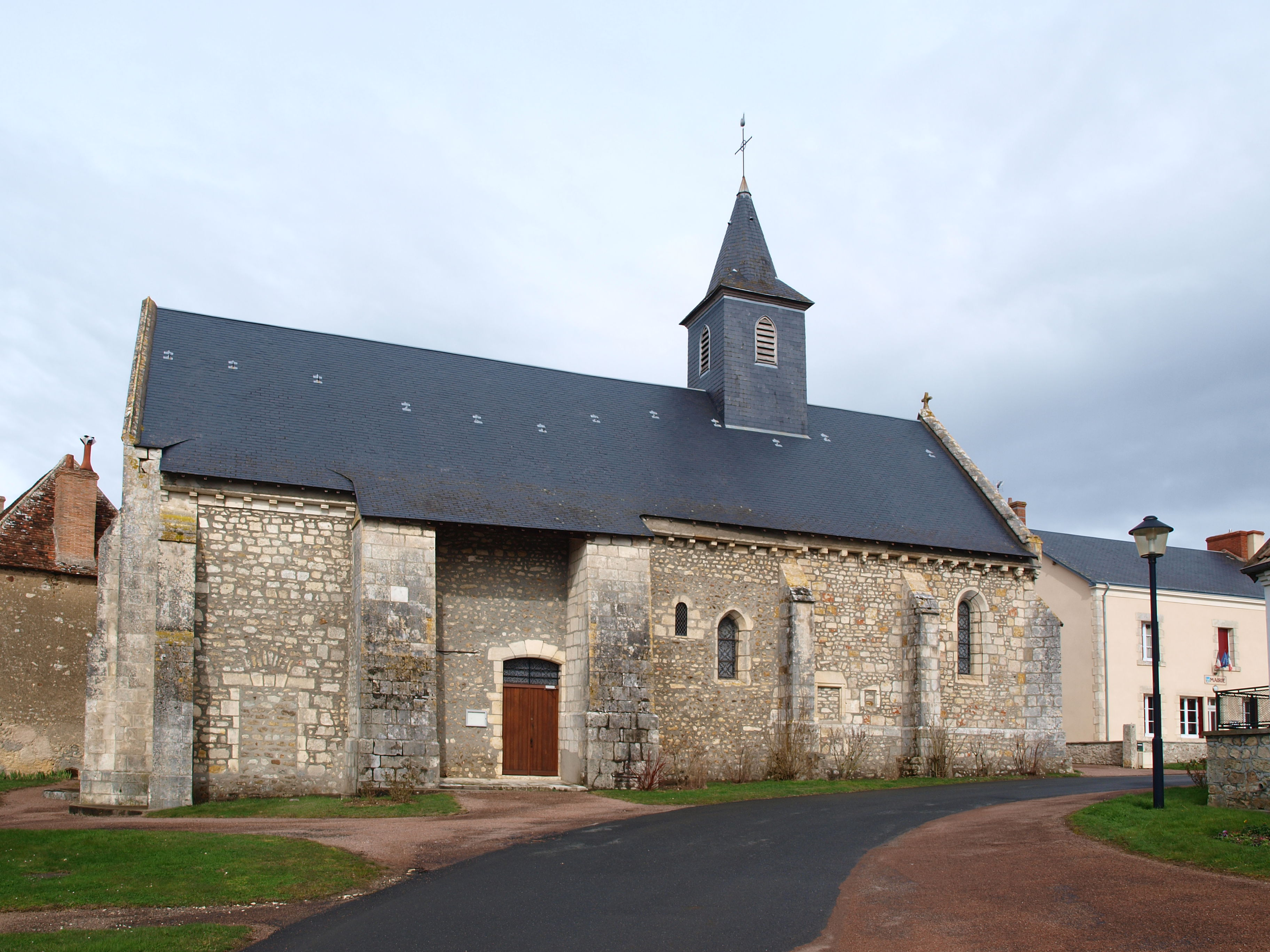 Église Saint-Maximin de Jeu-les-Bois (Indre, France)